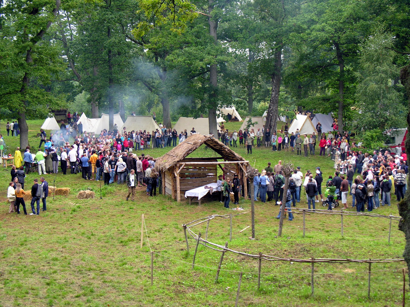 Baltijos jūros regiono senovės genčių karybos ir amatų festivalis „Apuolė 854" ant Apuolės piliakalnio (Skuodo raj.)